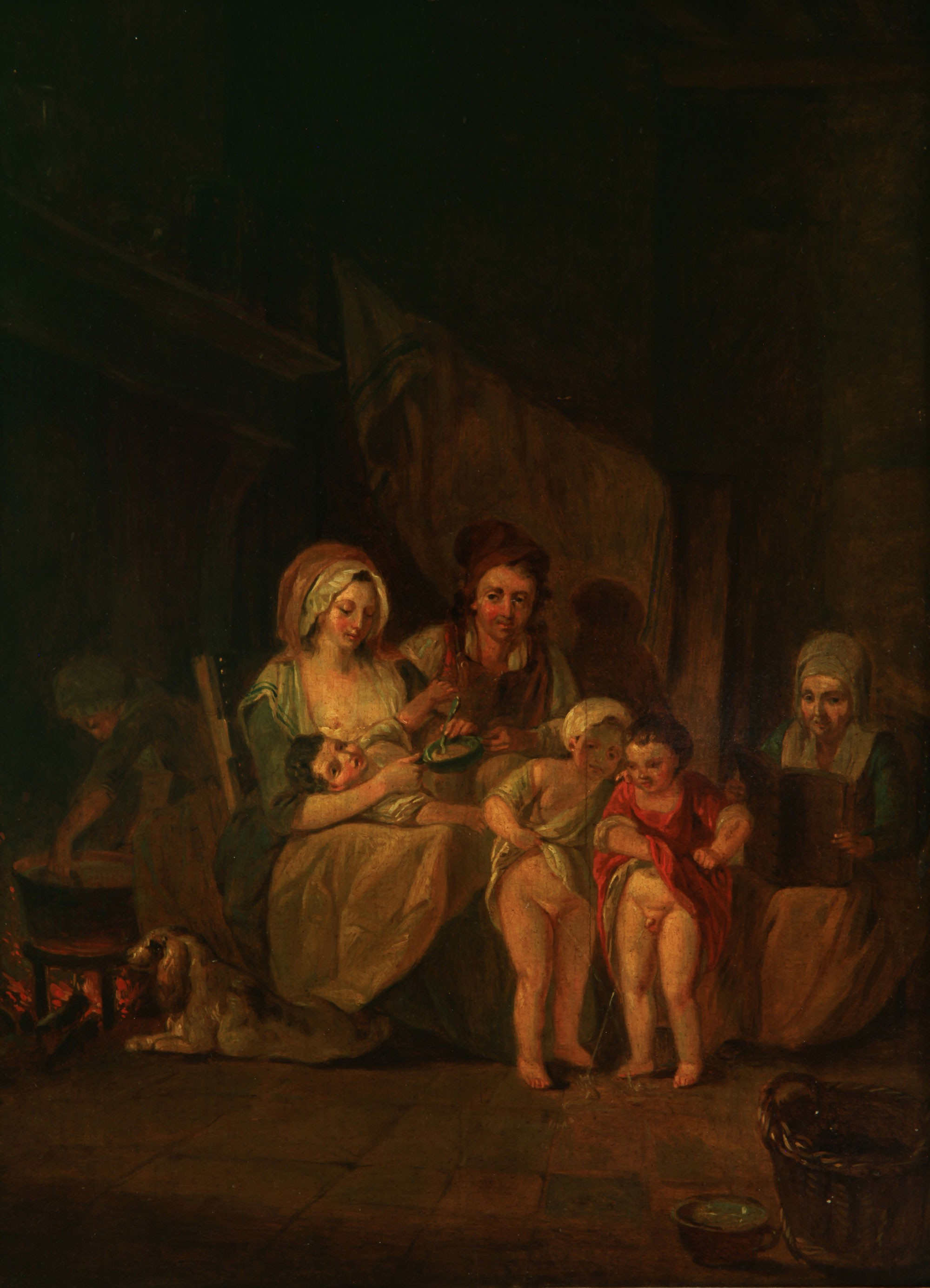 Louis Braquaval, Le marché de Moreuil. Siglo XIX. 37,8 x 46 cm, con marco: 66,6 x 77,7 x 7 x 16 cm, óleo sobre tabla. Inv. 2010.